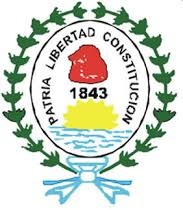 Paso de los Libres es la ciudad cabecera del departamento homónimo, provincia de Corrientes, Argentina. Fue fundada el 12 de septiembre de 1843 por el general Joaquín Madariaga. El municipio comprende la isla Guardaisla.